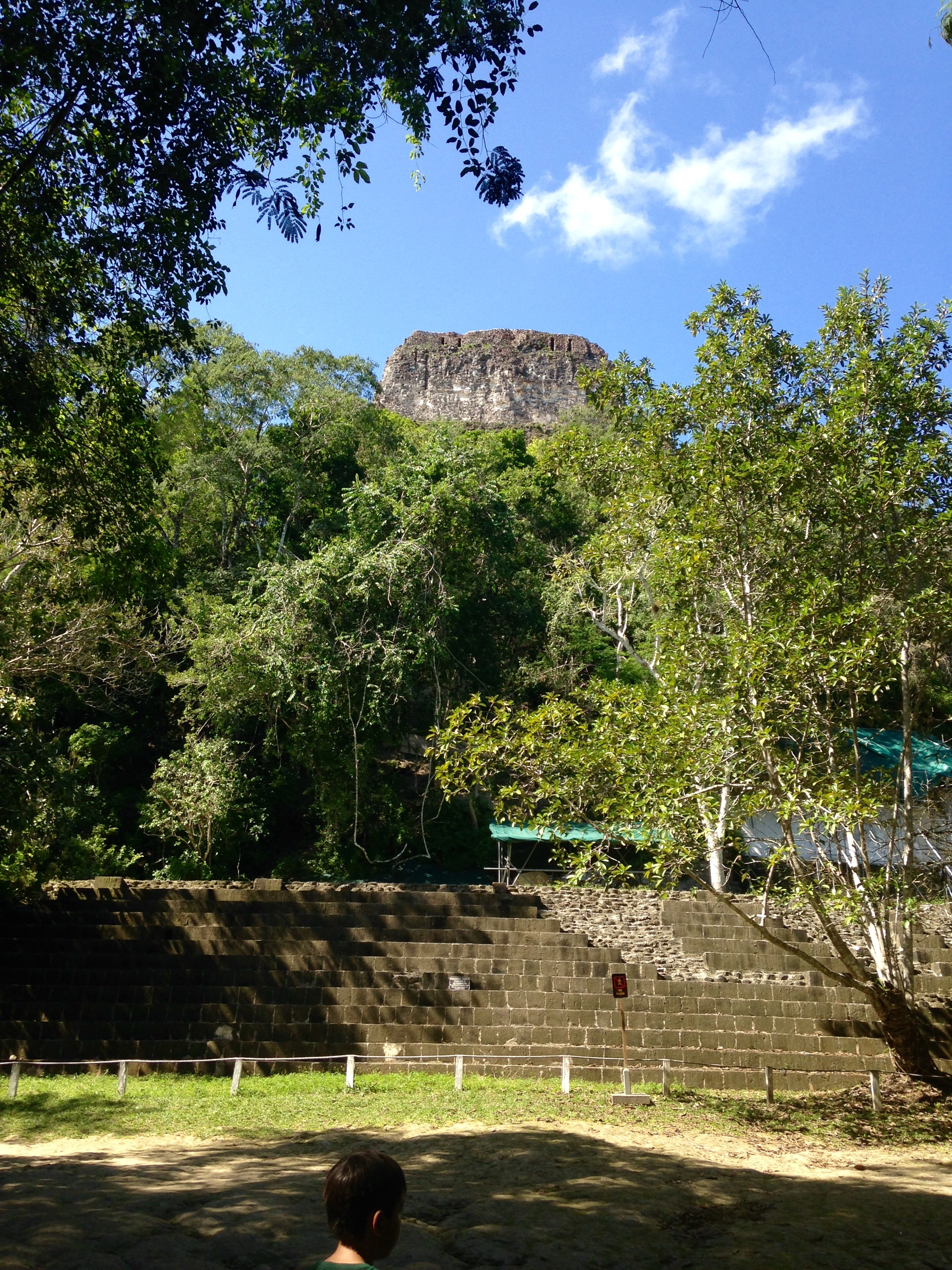 Vista frontal del Templo IV. La cúspide queda parcialmente cubierta por los árboles que no han sido removidos de la base de la pirámide.